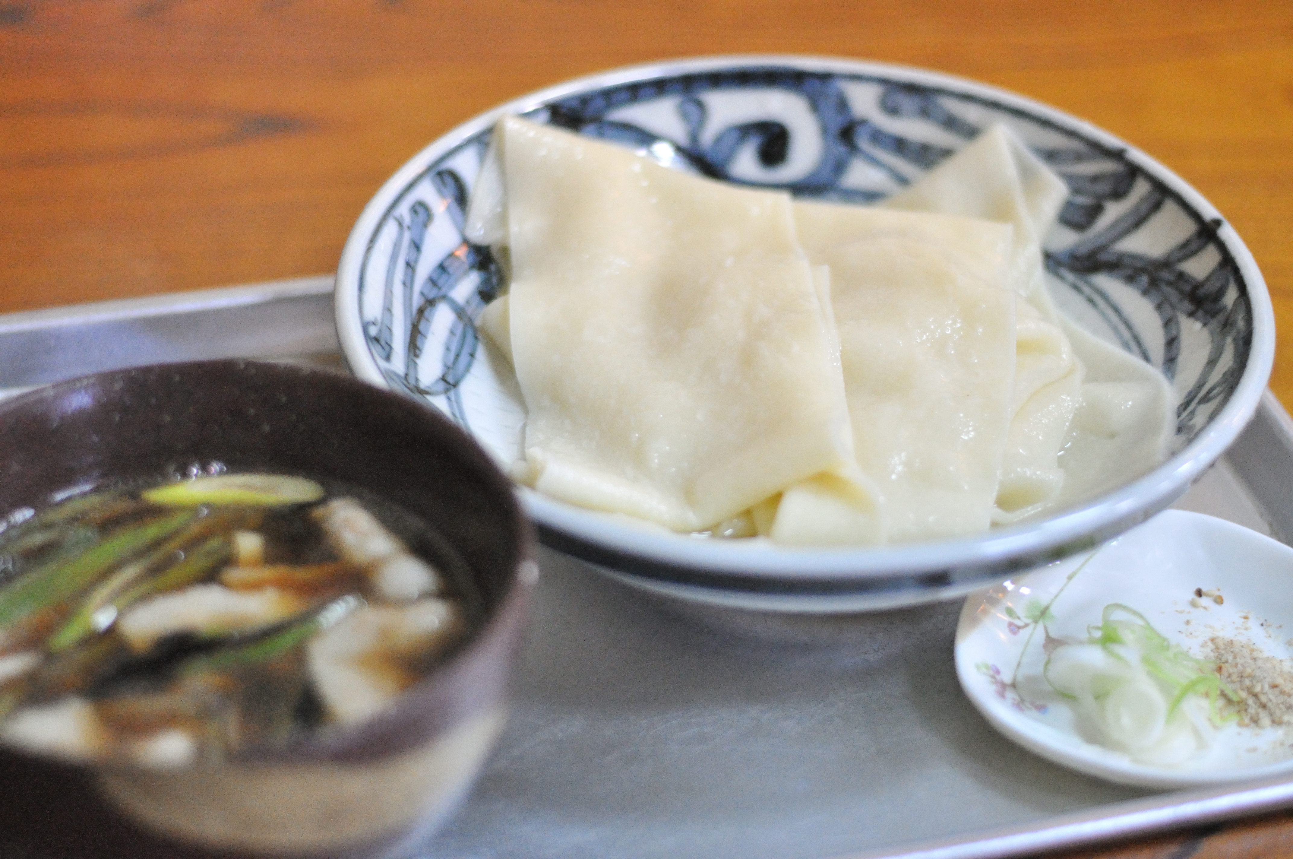 川幅うどんの参考画像。鴻巣市「小山屋食堂」の川幅うどん肉汁つけうどん